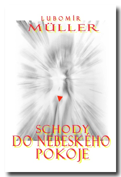 Titulní strana knihy Lubomíra Müllera Schody do nebeského pokoje